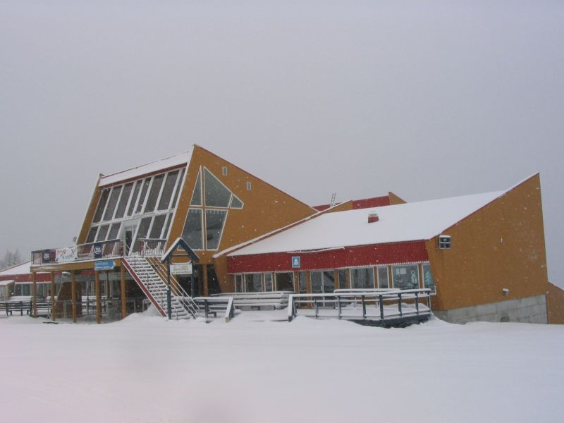 Châlet principal, Station de Ski Le Valinouët, QC, Canada